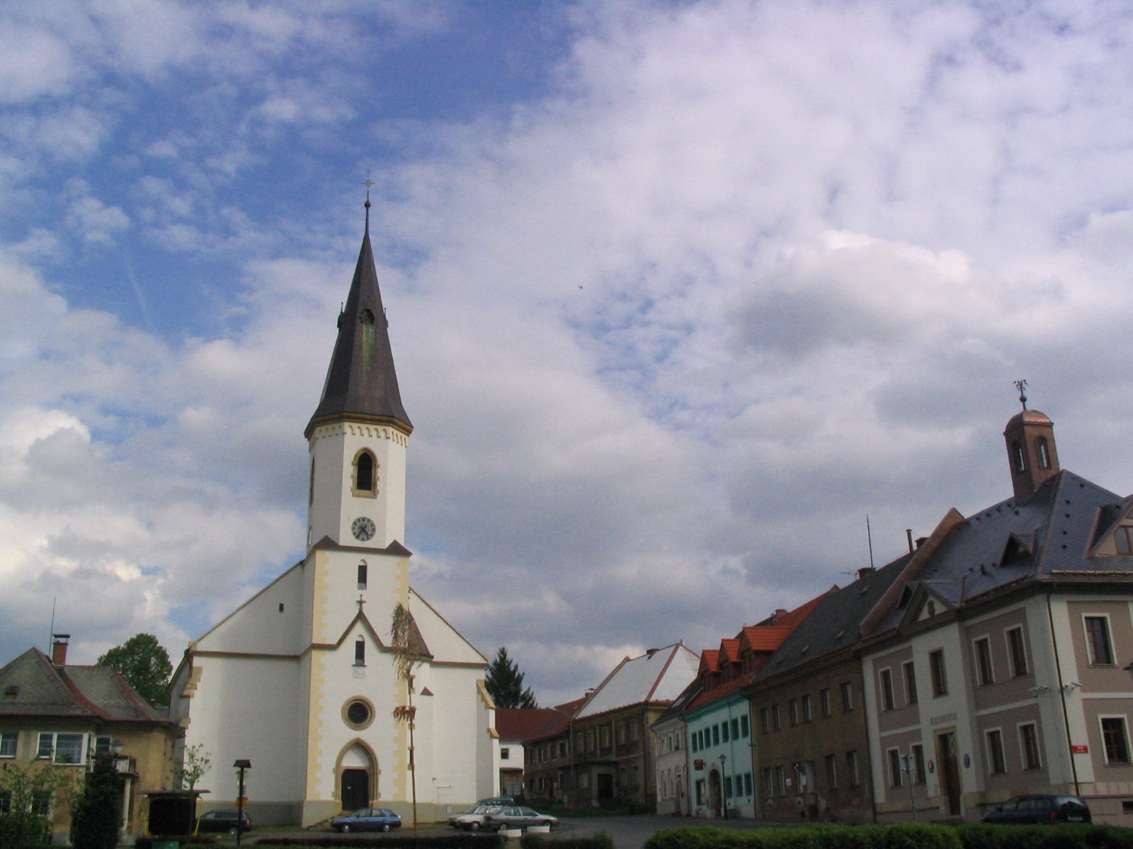 Kostel sv. Víta na náměstí v Osečné, okres Liberec